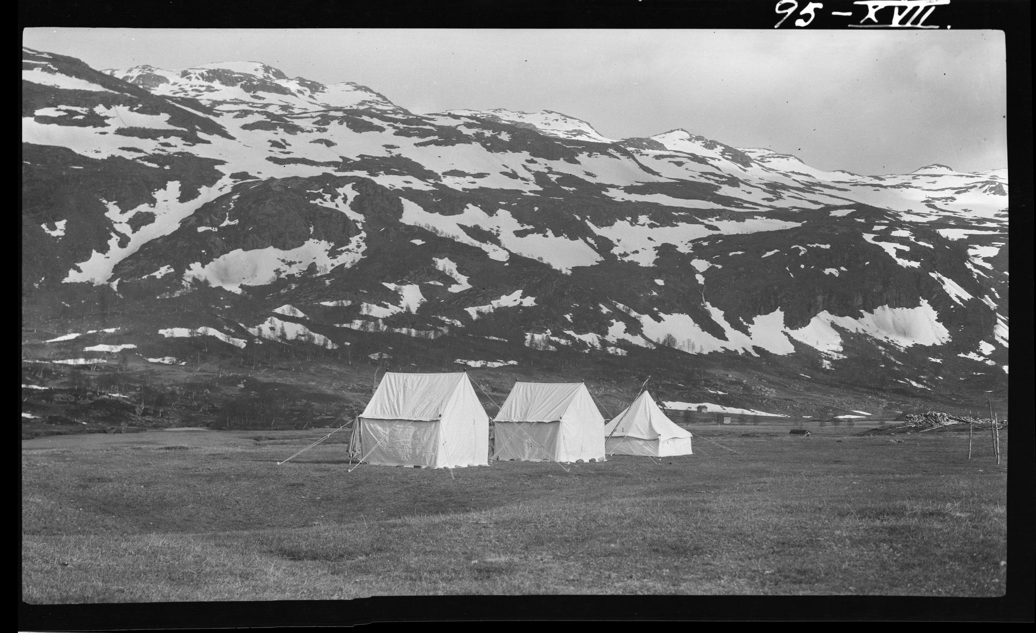 På tjenestereiser i felt kan telt være en grei løsning. En sommerdag i 1936 ble disse teltene satt ved Holdøla, Volldalselv (Suldalslågen). Hydrologisk avdeling. Dato: 08.06.1936